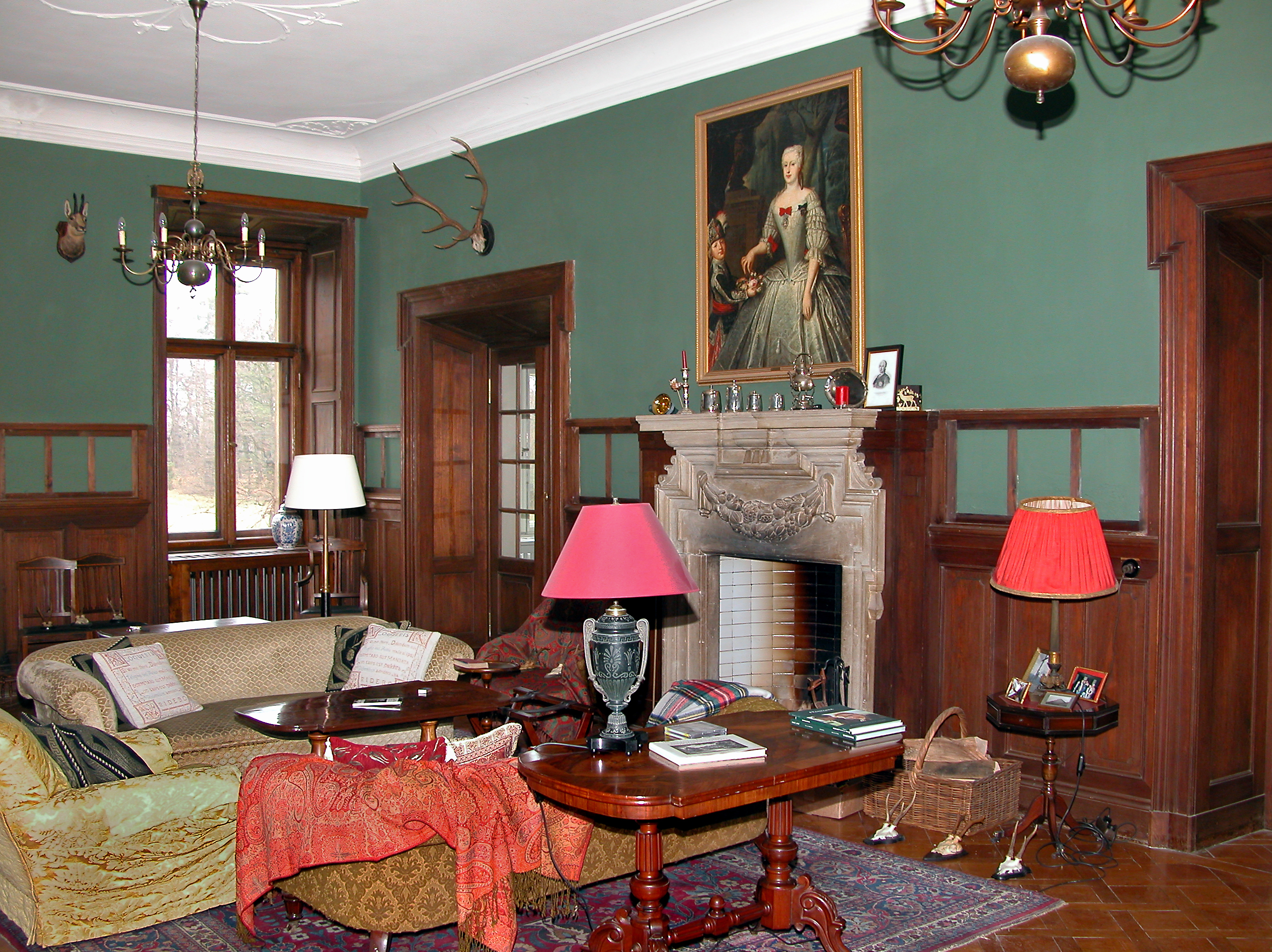 16.03.2008 02633 Gaußig: Schloß, erbaut um 1700 im Barockstil. Ende des 18. Jh. klassizistisch umgestaltet. Jagdzimmer im Erdgeschoß mit Gemälde der Franziska Gräfin von Brühl (1717–1762), geb. Gräfin Kolowrat-Krakowsky, Gattin von Heinrich Graf von Brühl. [DSCN31946.TIF]20080316505DR.JPG(c)Blobelt